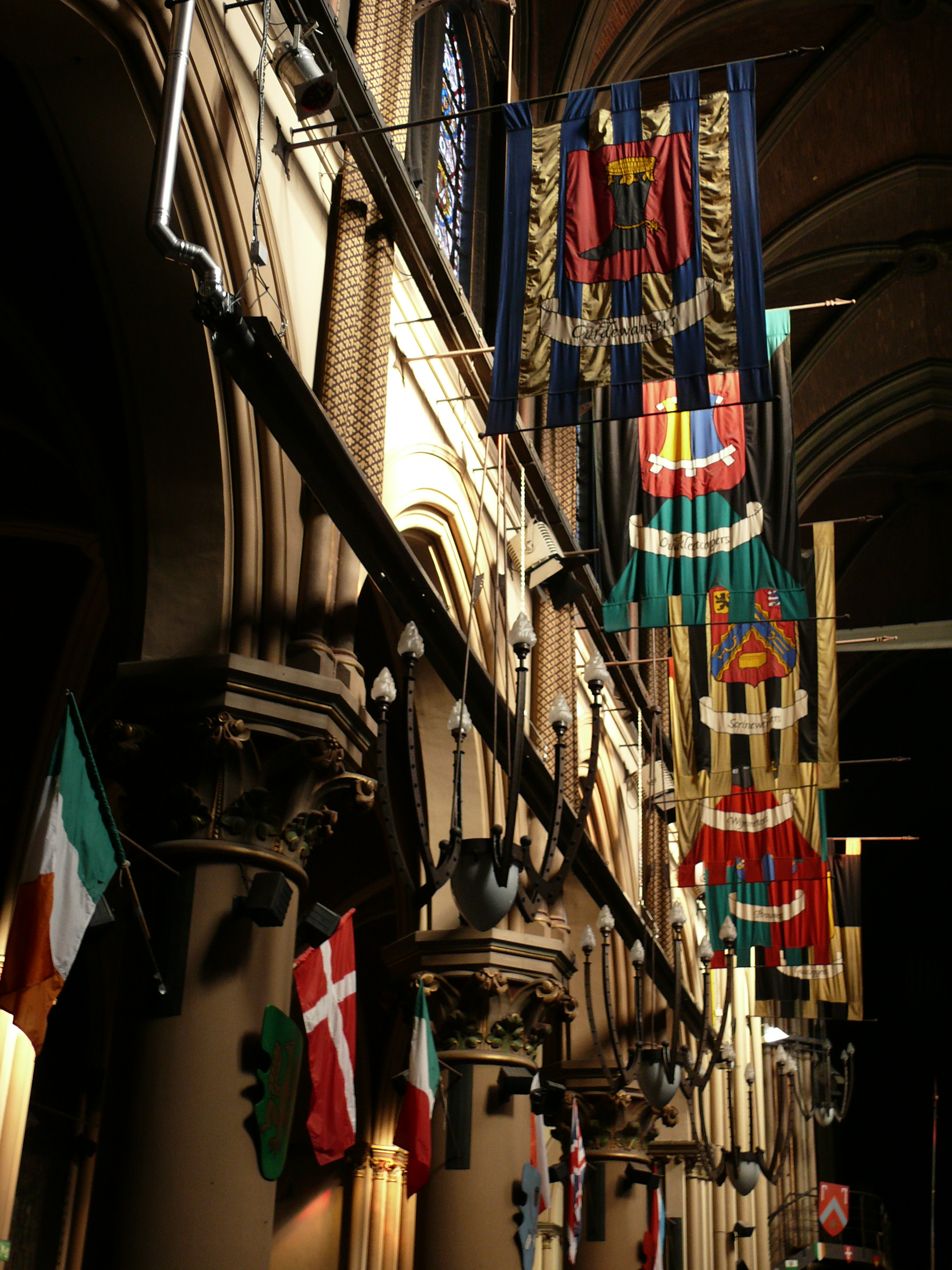 Sfeervol en rijkelijk bevlagd interieur